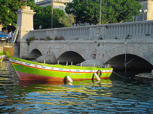 Ponte Umbertino con barchetta, Siracusa